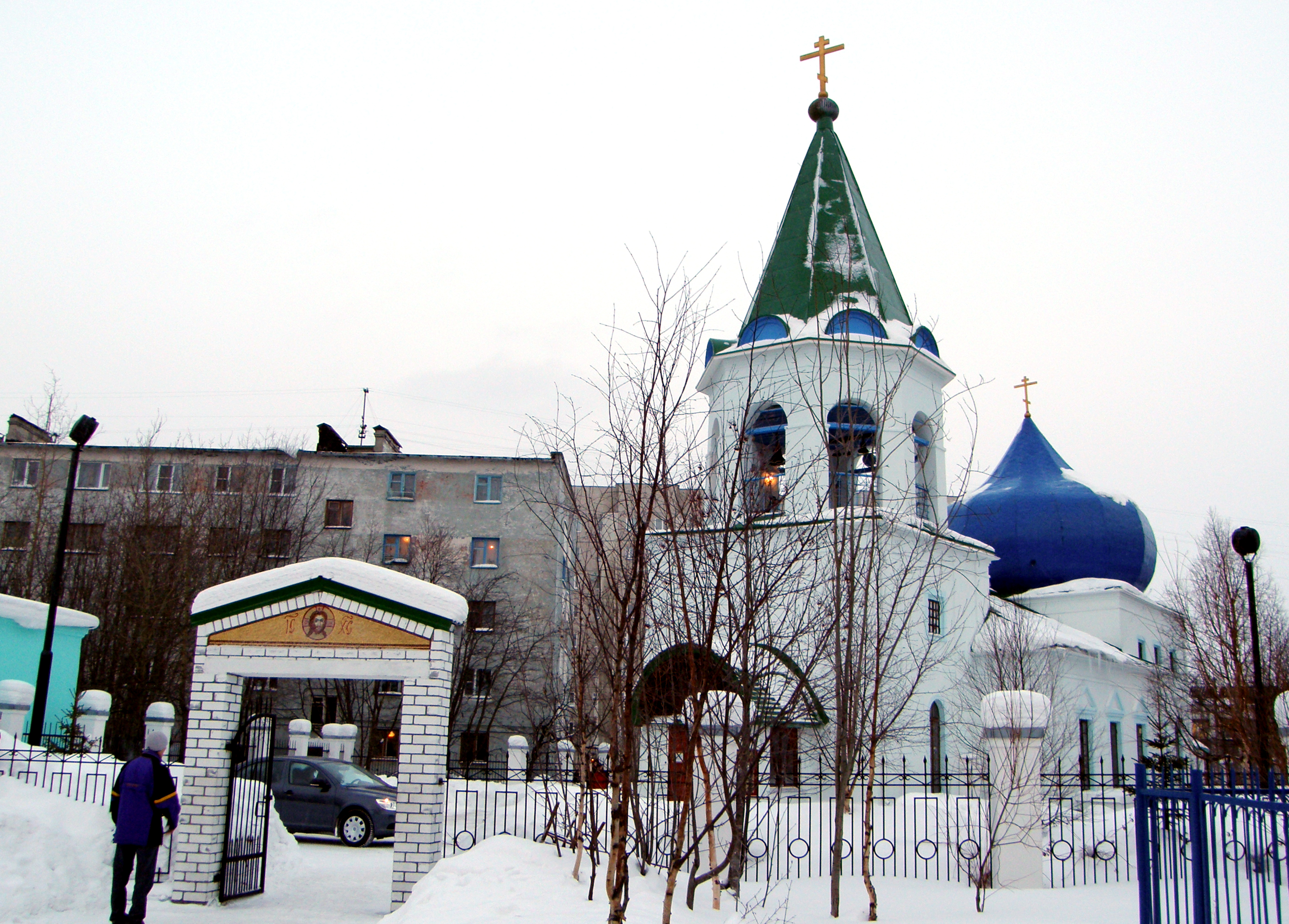 Благовещенская церковь (Мурманская область, Кола, Защитников Заполярья проспект, 22)